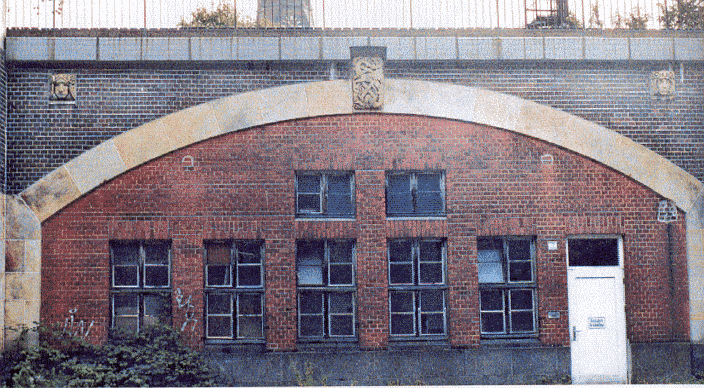 Werkstatt unter der Hamburger Hochbahn (Immenhof) 2003